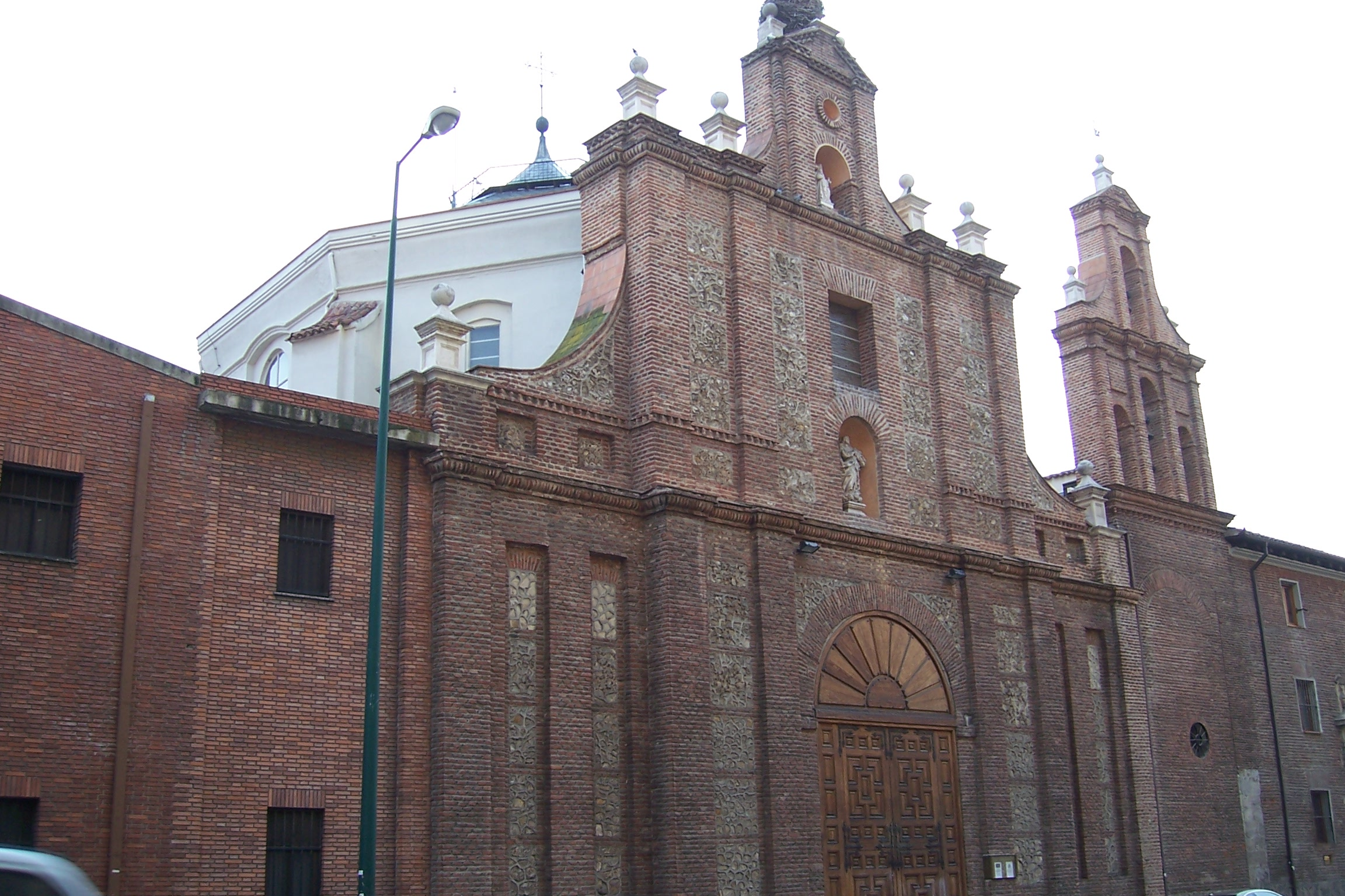 Colegio de Ingleses en Valladolid (España). Fachada del edificio.